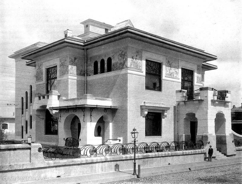 Особняк А. А. Рябушинской (С. П. Рябушинского) , архитектор Ф. О. Шехтель, 1900-1903